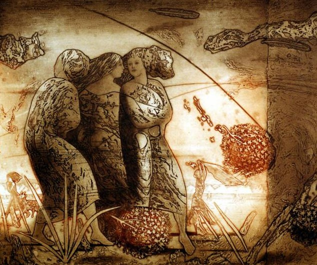 «Рождение Шторма», офорт из серии «Ветры Киммерии». 1986 г.